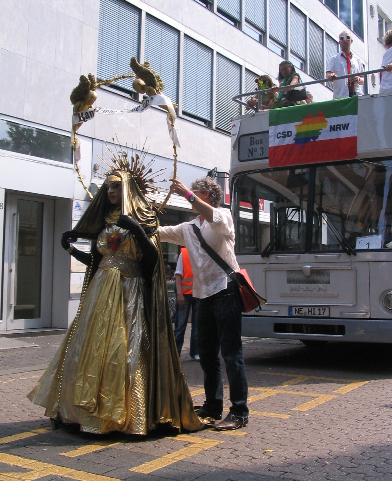 Christopher Street Day in Düsseldorf